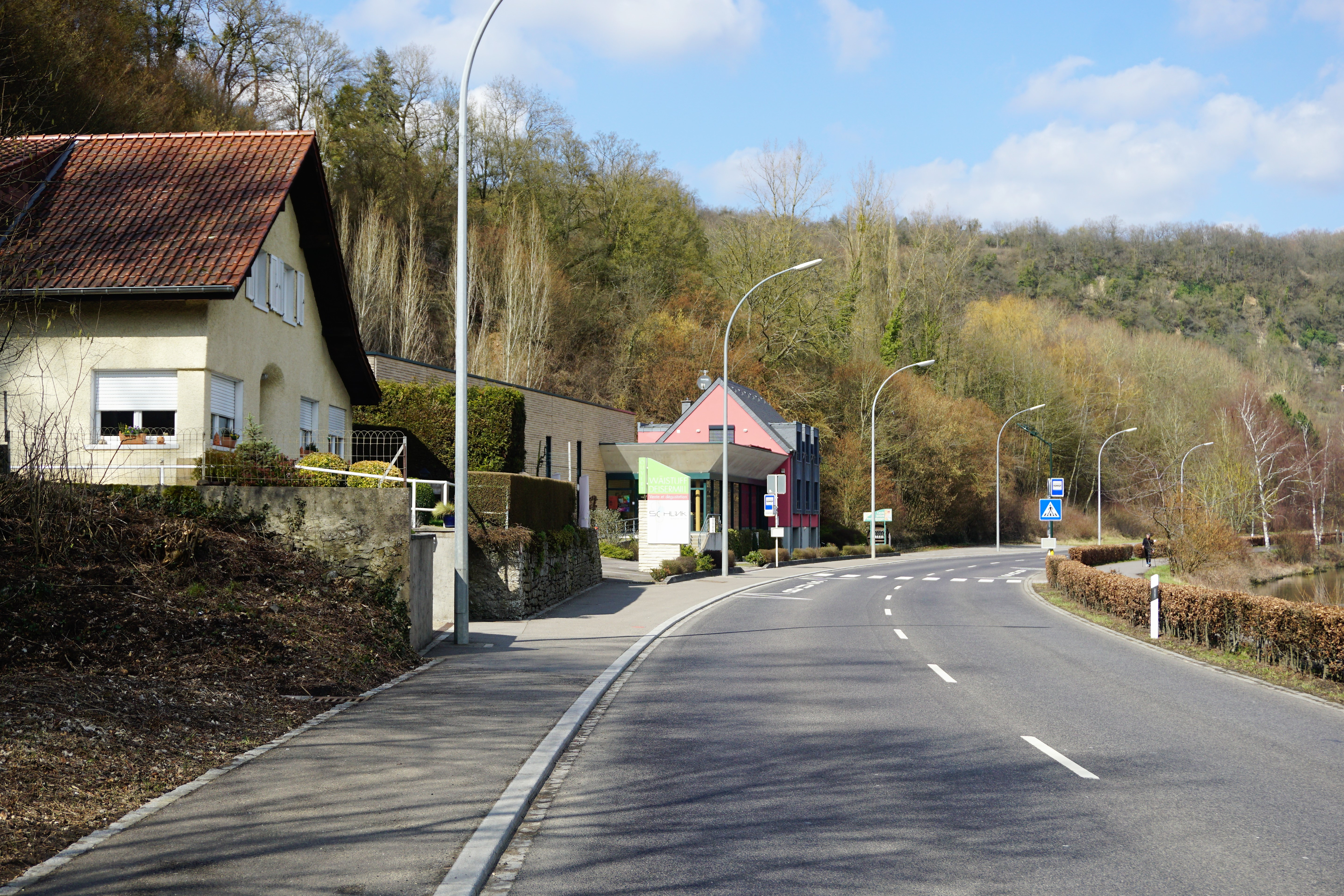 Wormeldange, lieu-dit Deisermillen. La Route nationale 10 en direction nord.